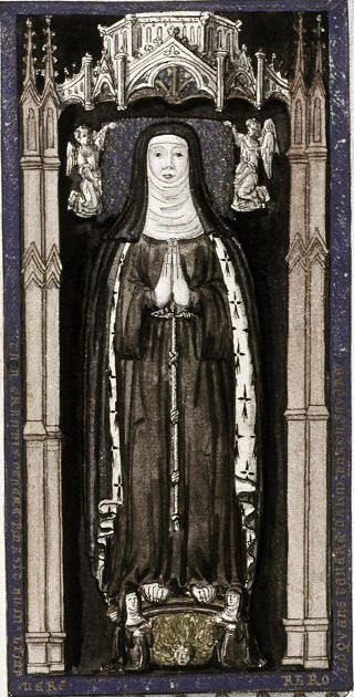 Isabelle de France (1225-1270) Česky: Isabela Francouzská